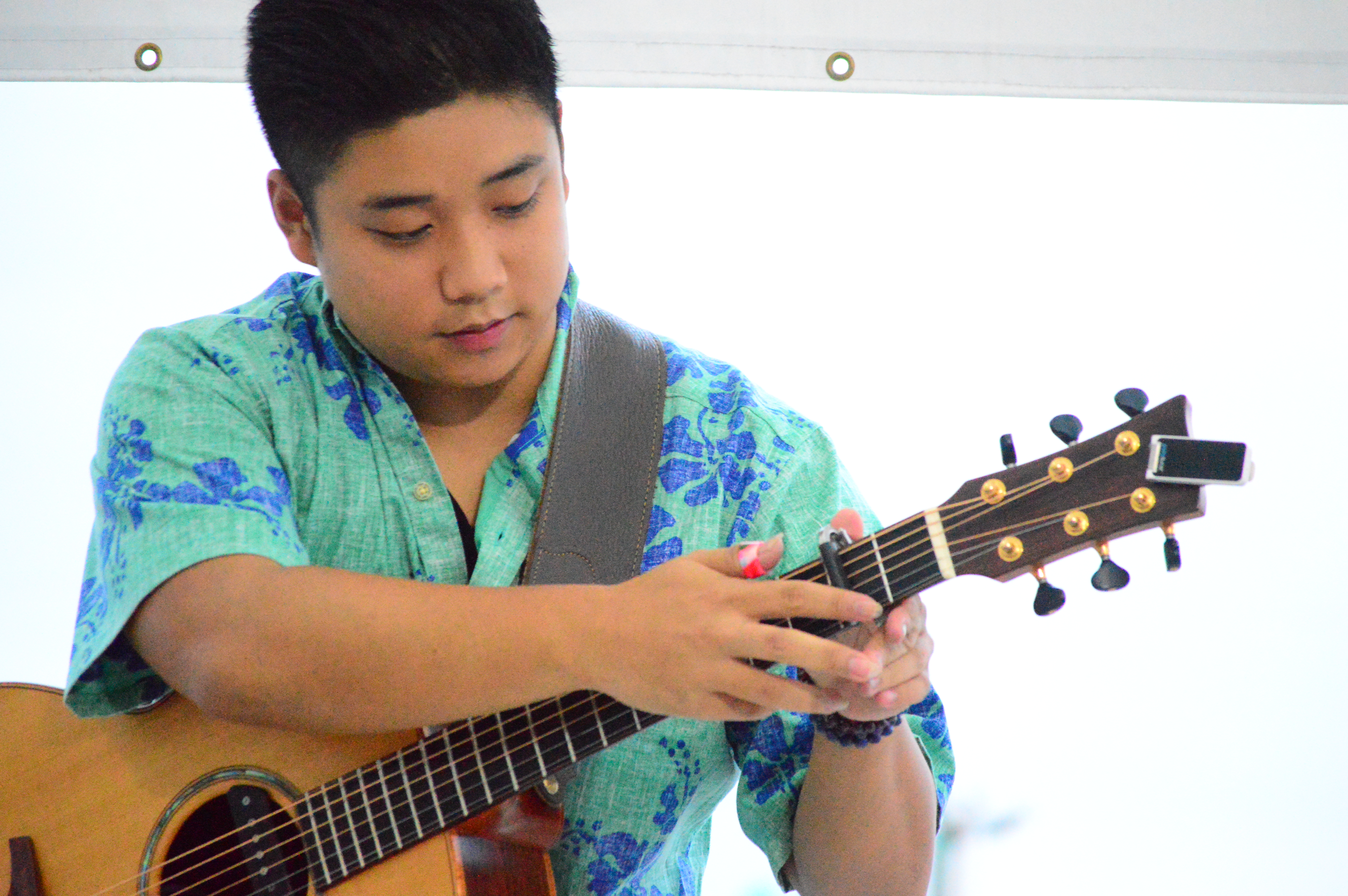 2017.08.3江ノ島にて撮影